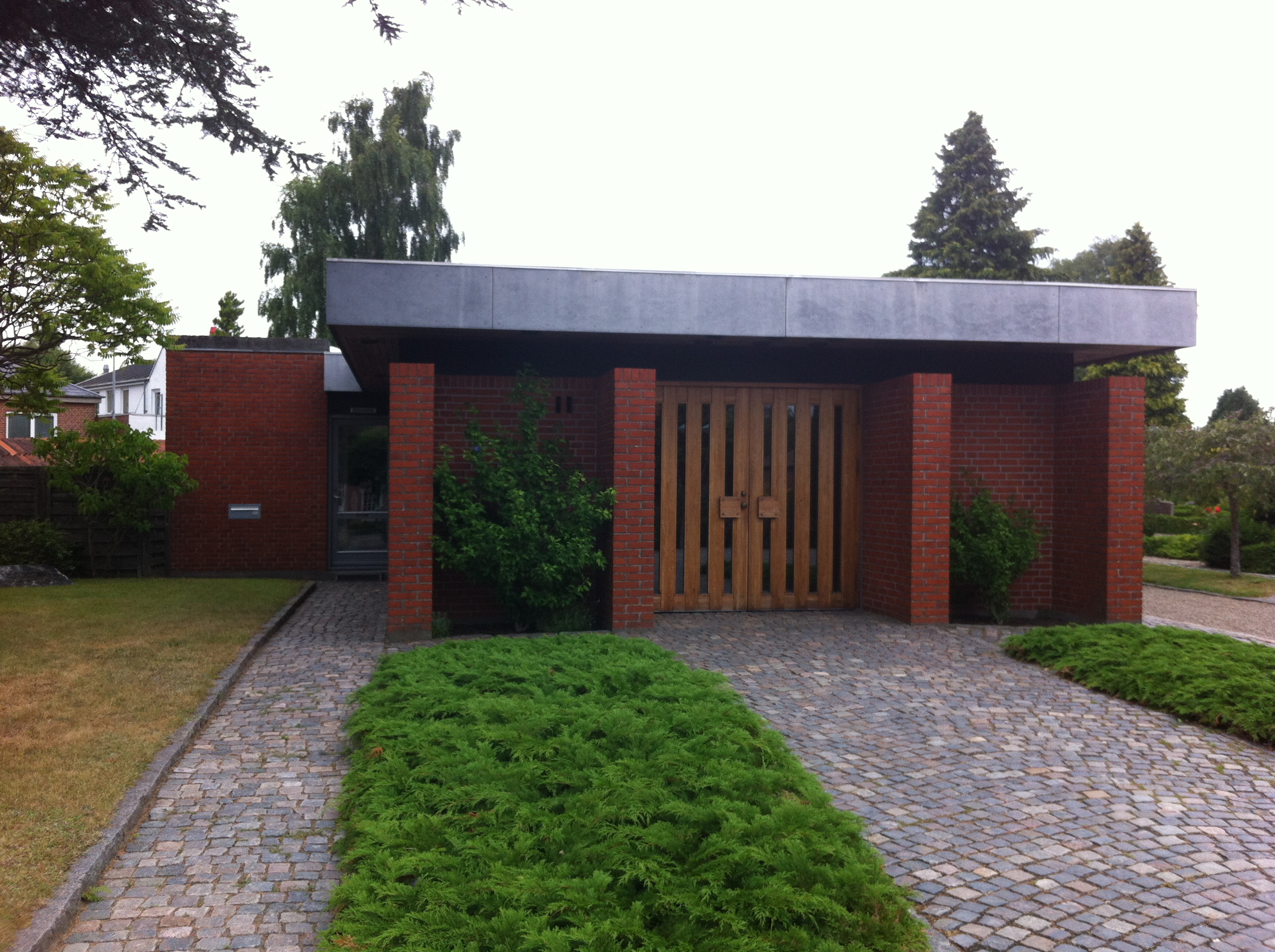 Kapellet til Hadsund Kirke.